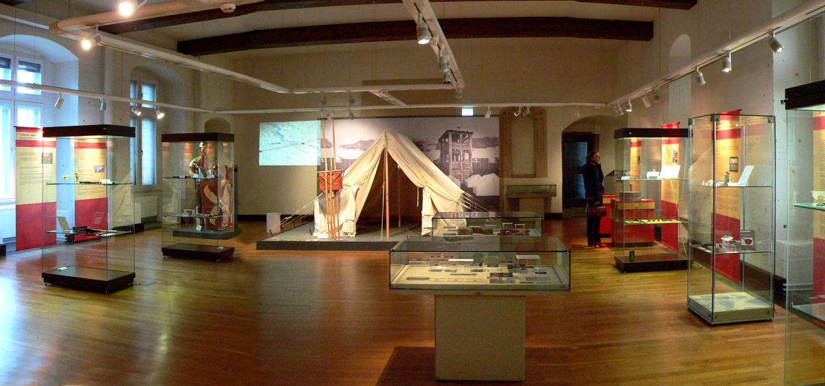 Museumsaustellung zum Römerlager Hedemünden im städtischen Museum Hann. Münden